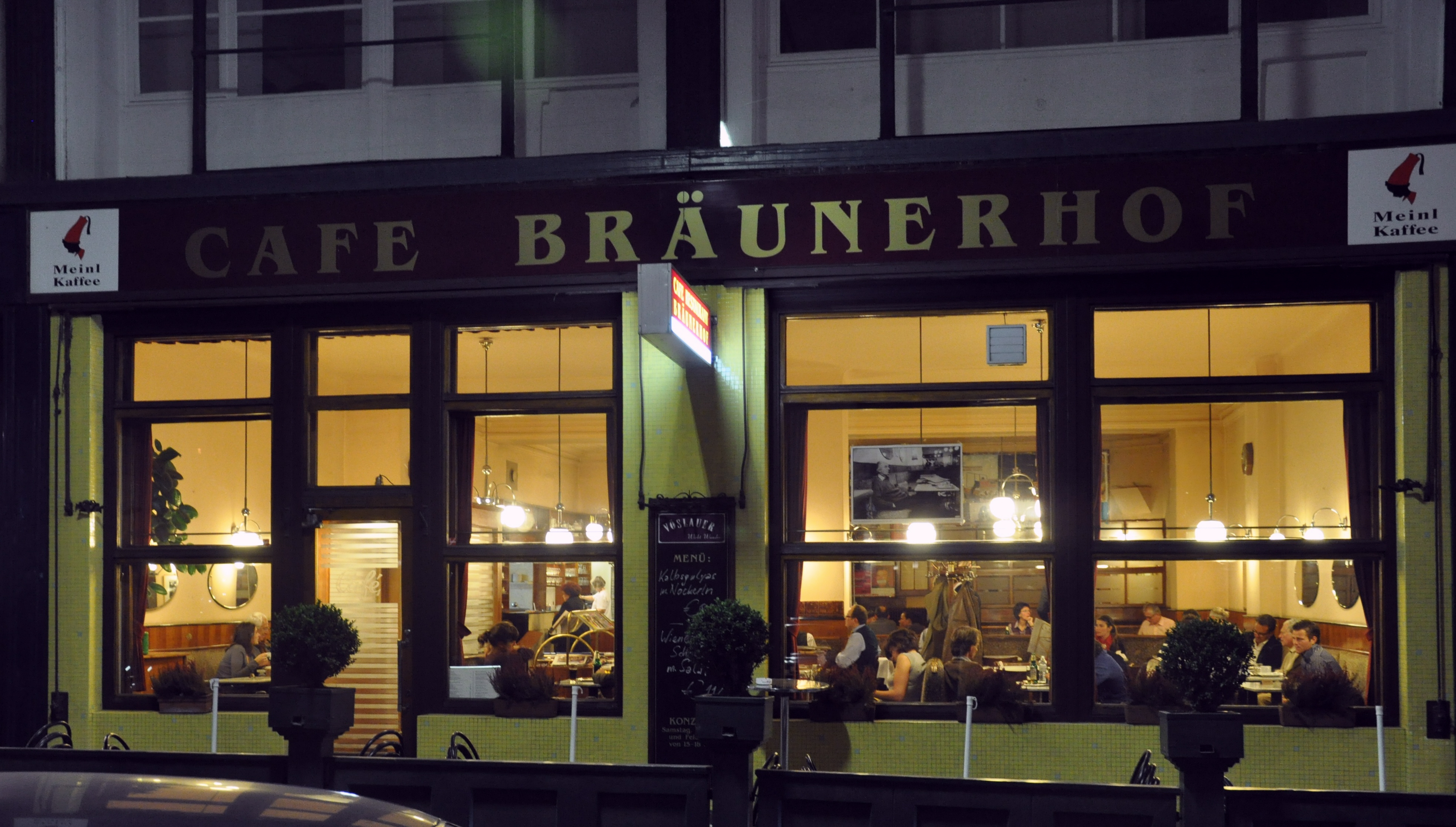 Wien, Café Bräunerhof abends